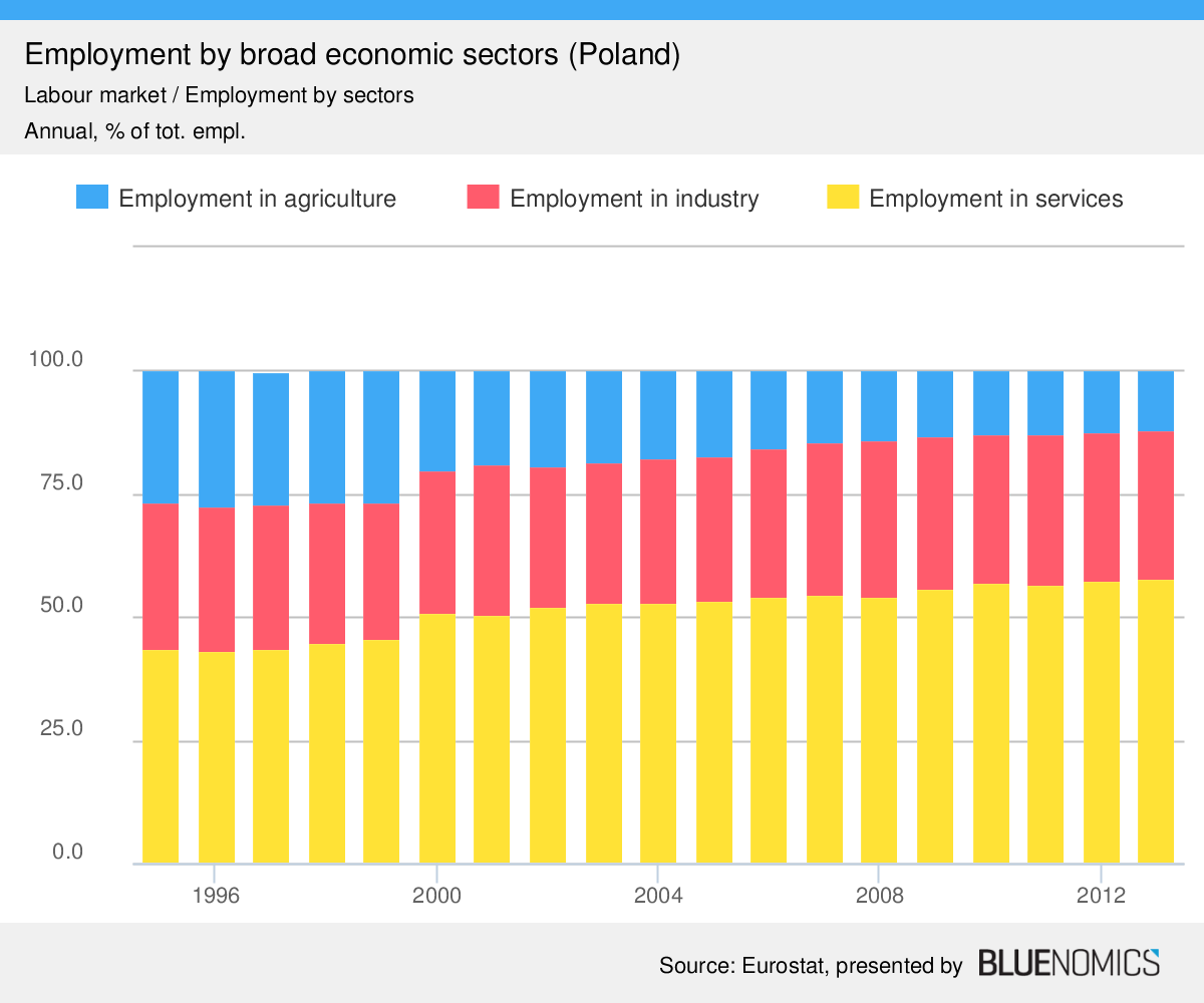 Diese Graphik zeigt den sektoralen Wandel der Beschäftigung in Polen